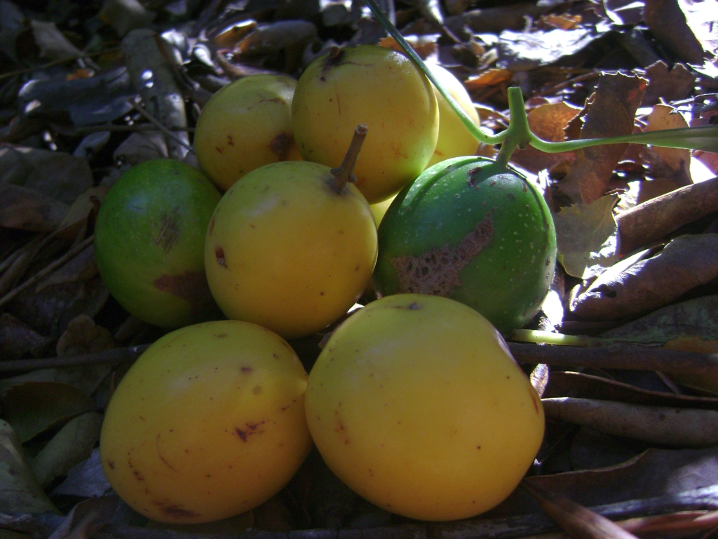 © Pablo Bravo Monasterio Relictos siempreverdes de Queule (Gomortega keule (Mol.) Baillon.)